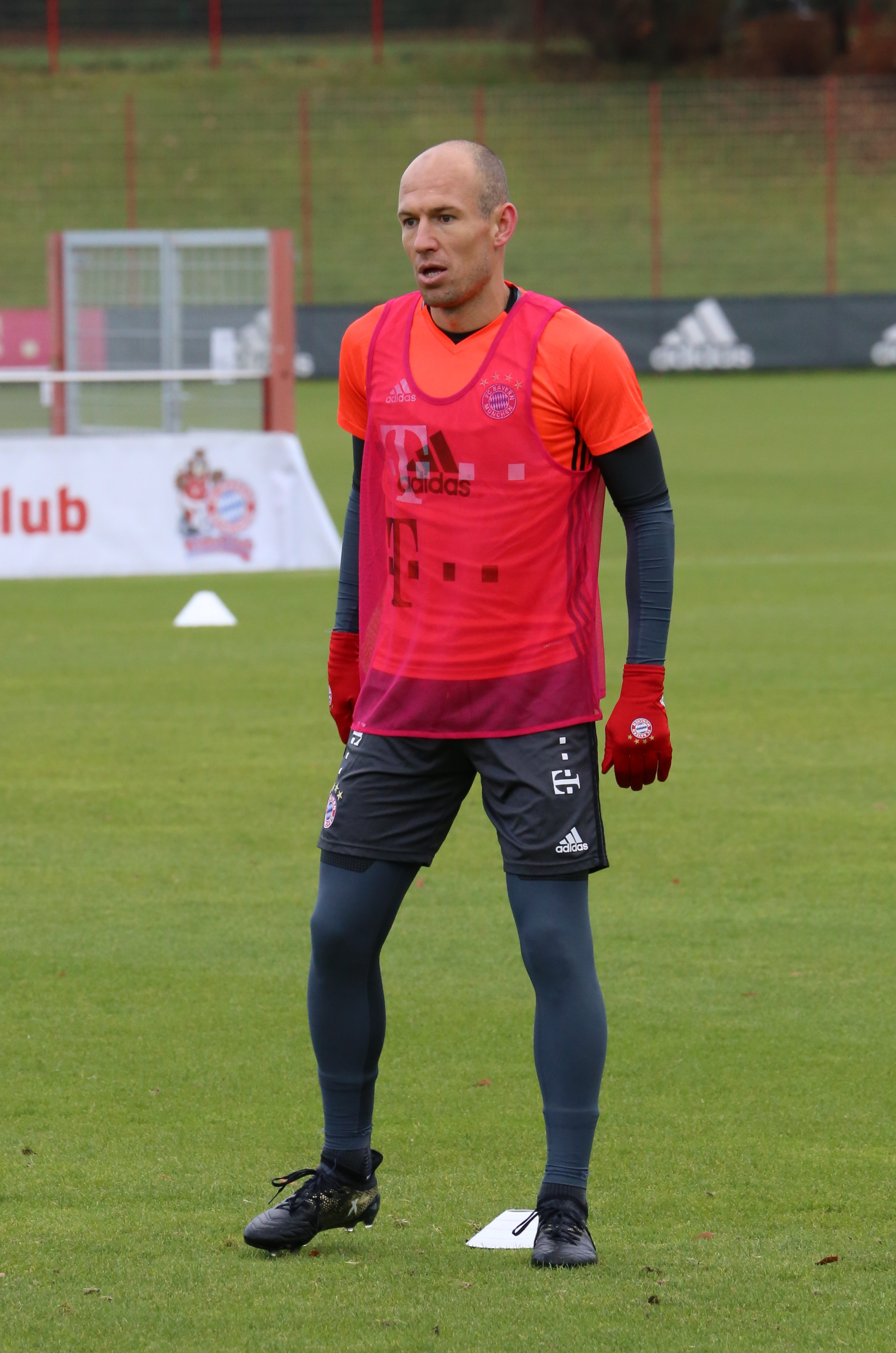 Arjen Robben beim Training auf dem Gelände des FC Bayern München (November 2016)